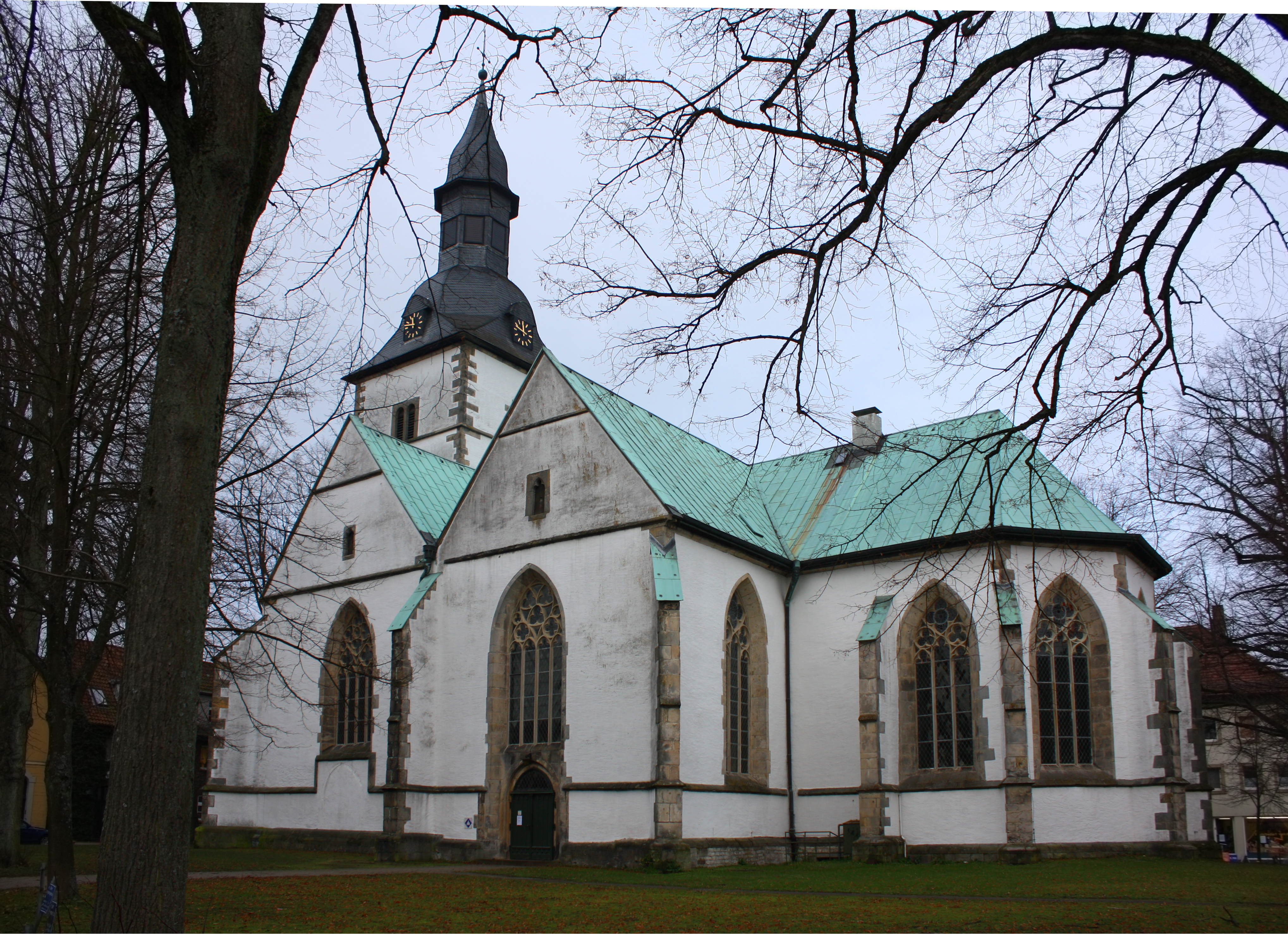 Evangelische Kirche in Horn, Blick auf die Apsis